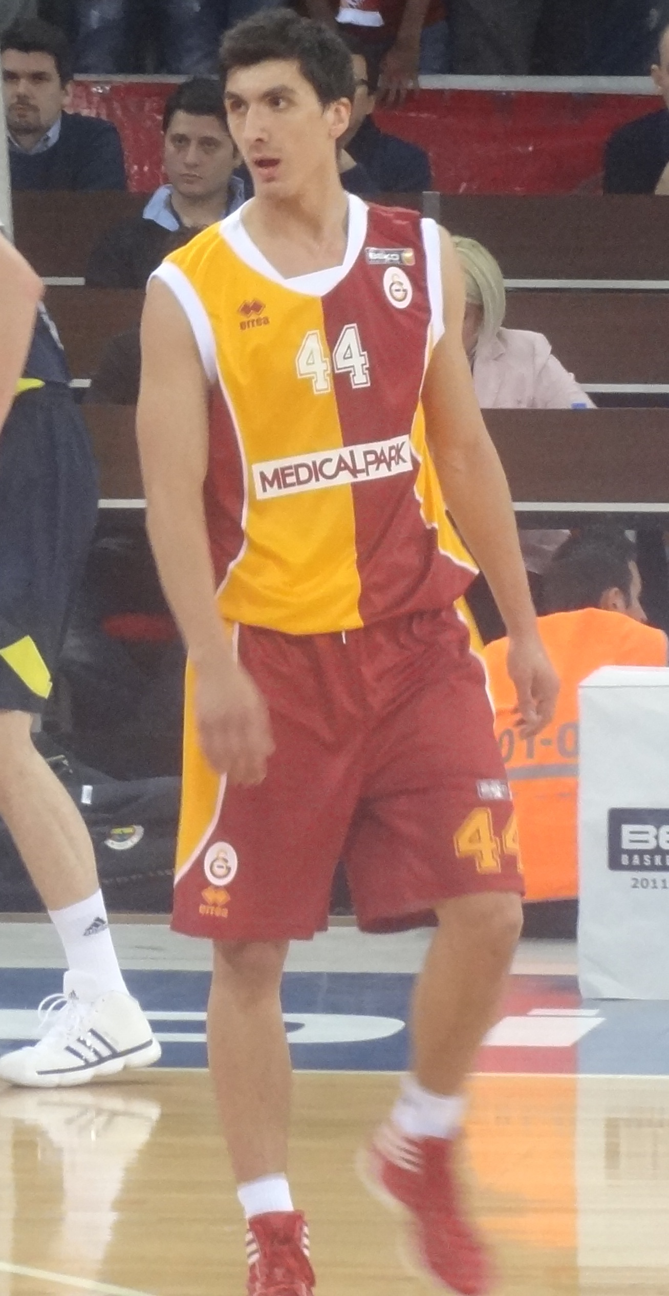 Nihad Fener maçında